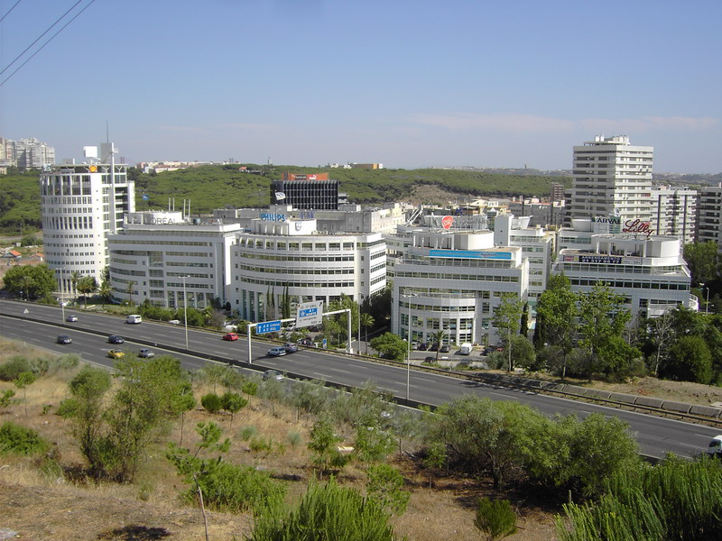 The Arquiparque Business Park in Oeiras municipality, Portugal.